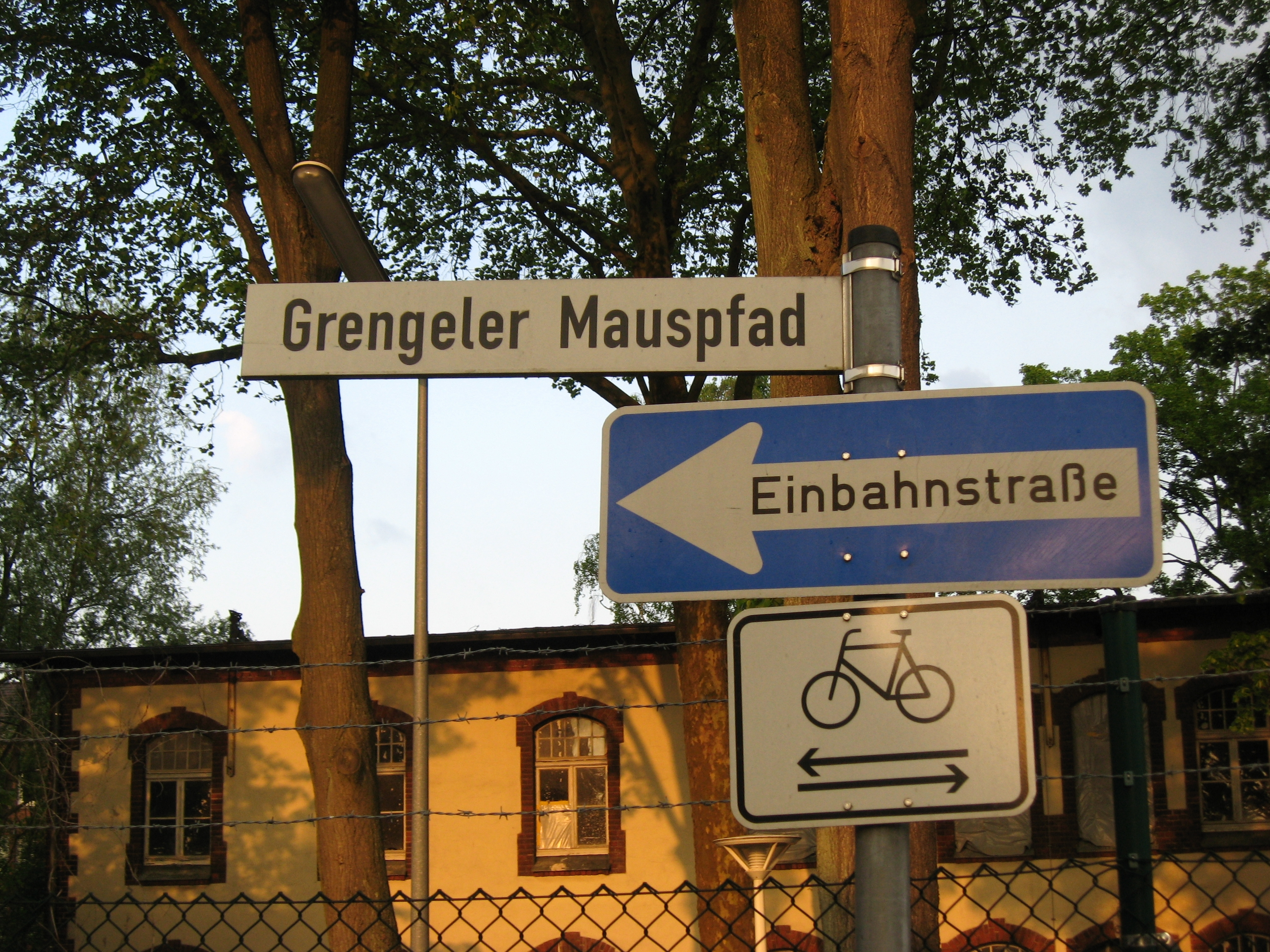 Straßenschild "Grengeler Mauspfad" in Köln-Wahnheide Datum: 28.04.2011 Urheber: M. Pfeiffer alias Benutzer:Gordito1869 Quelle: privates Fotoarchiv des Urhebers